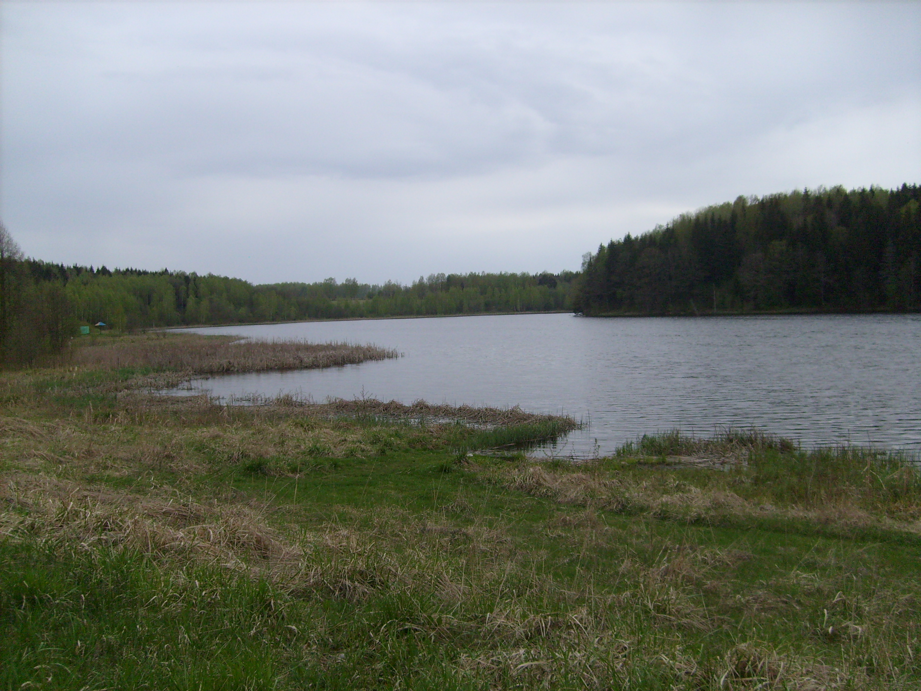 Трилесинское водохранилище (Шиповка)